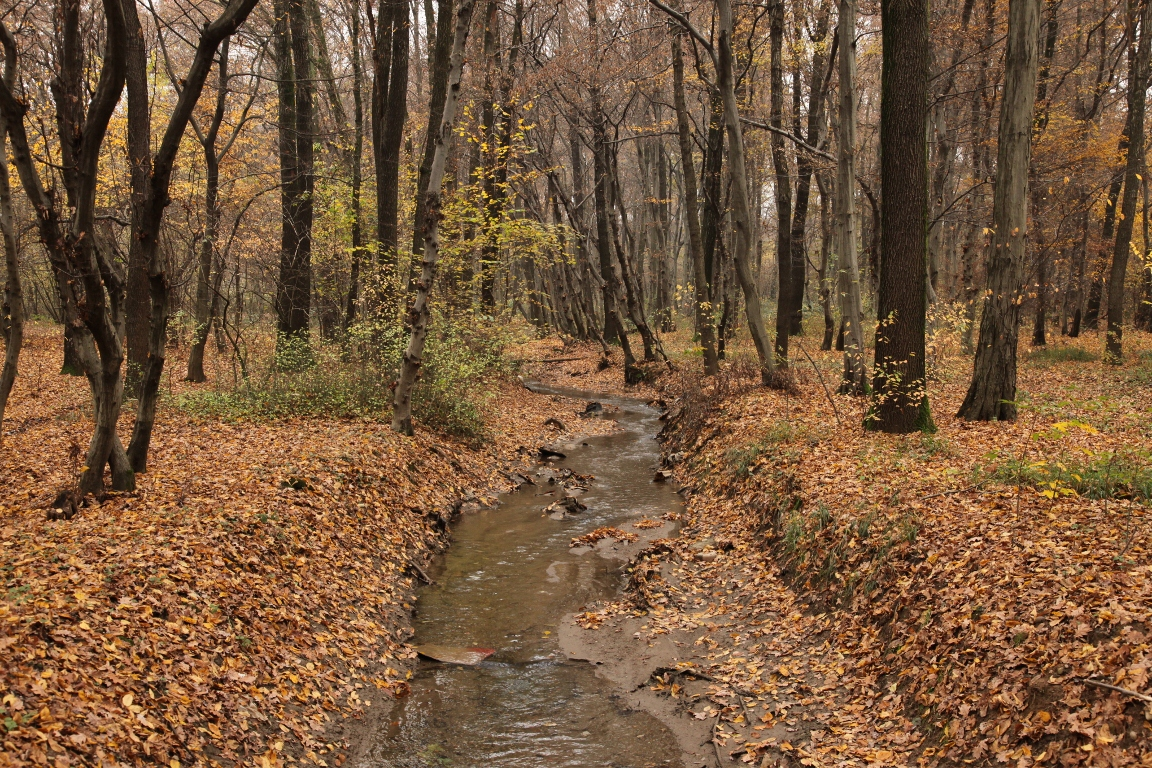 Parco Groane 11/2010